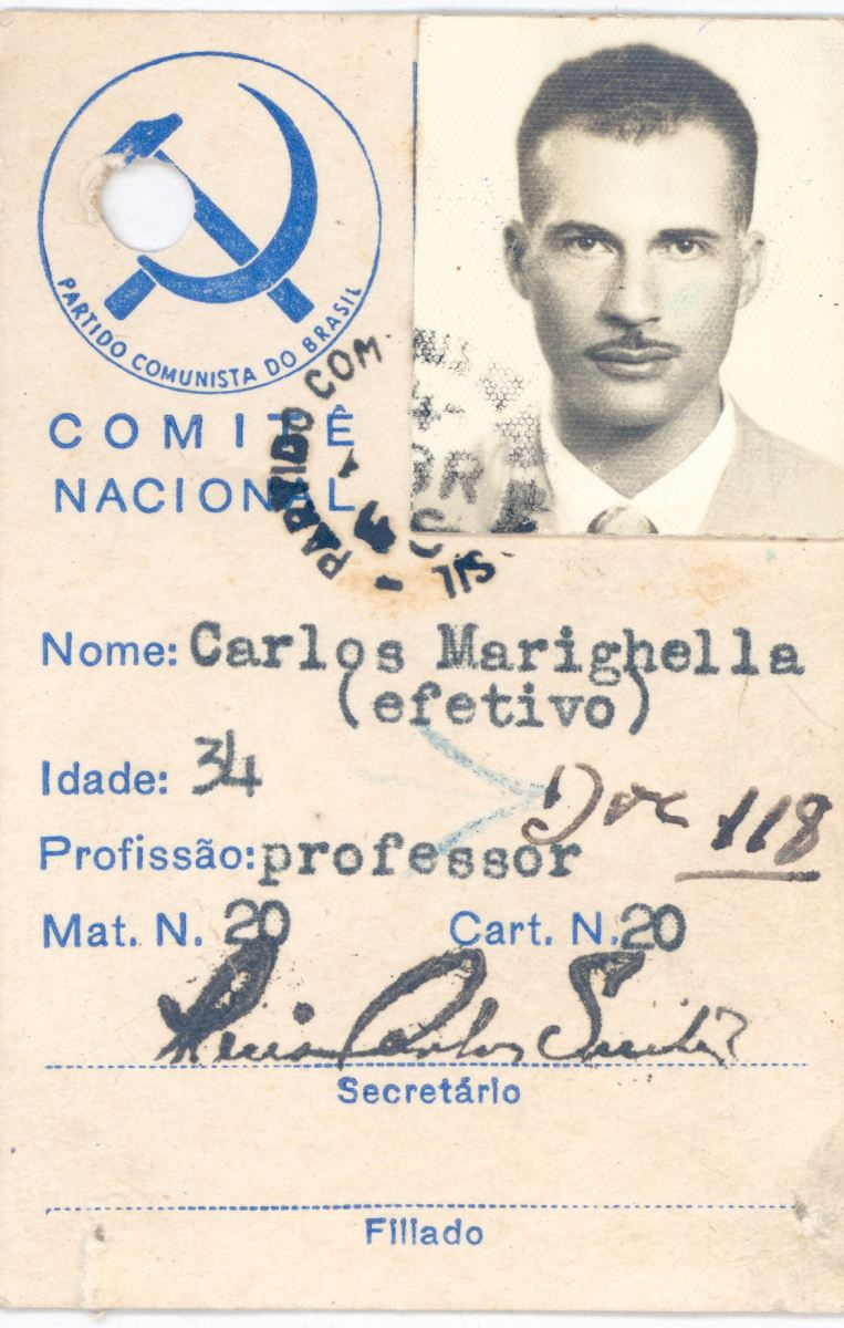 Carteira do PCB emitida em um período de legalidade do partido, de 1945 a 1947.